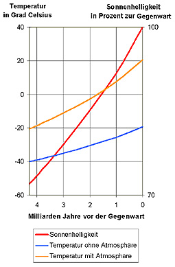 Sonnenhelligkeit